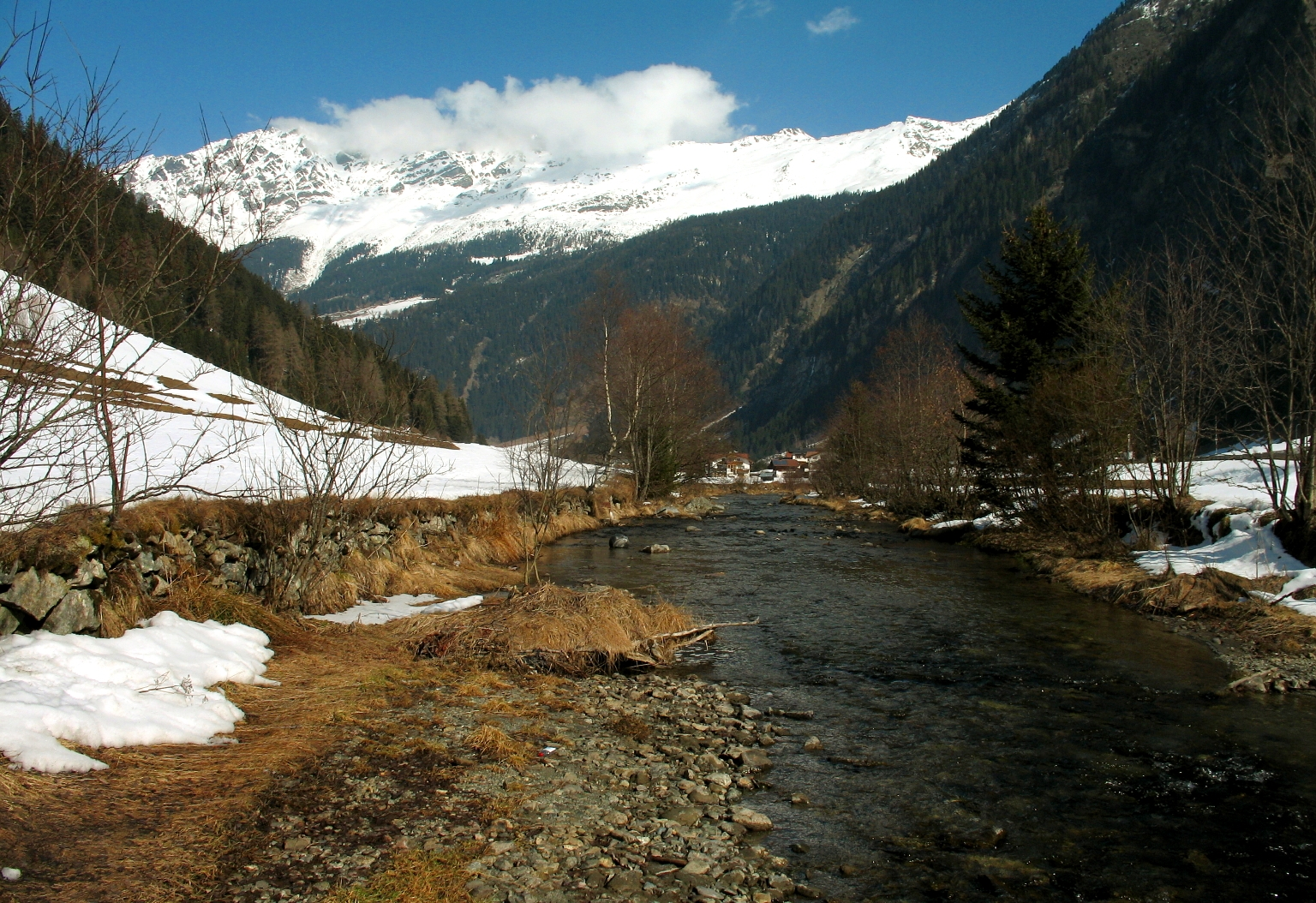 Faggenbach bei Unterhäuser, Kaunertal, Tirol